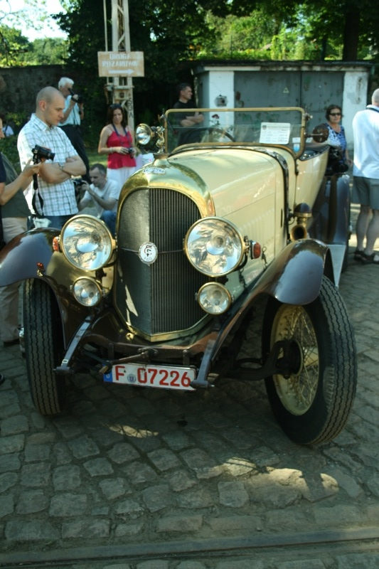 Stoewer (Szczecin)